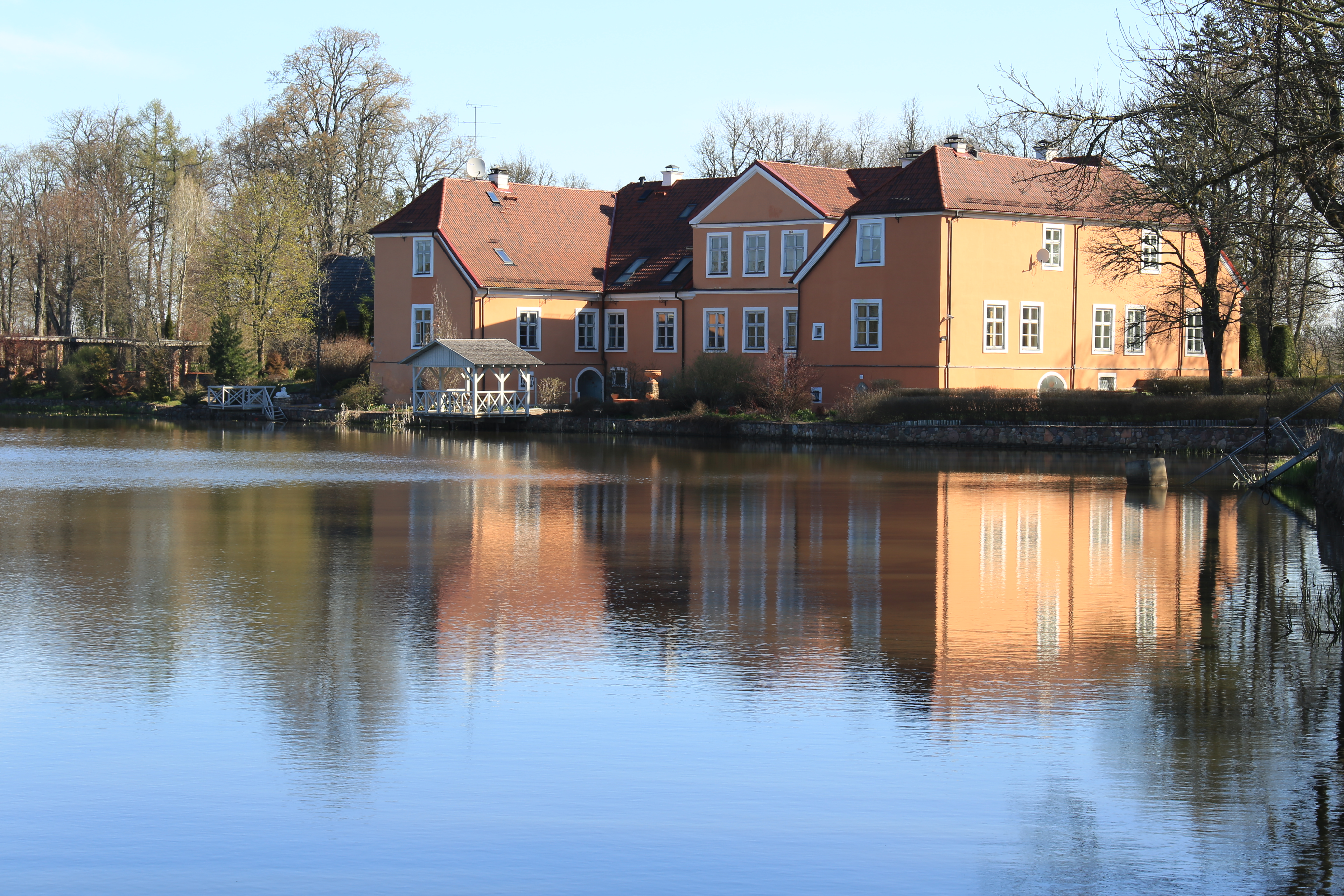 Kungu māja, Jaunsātu pagasts